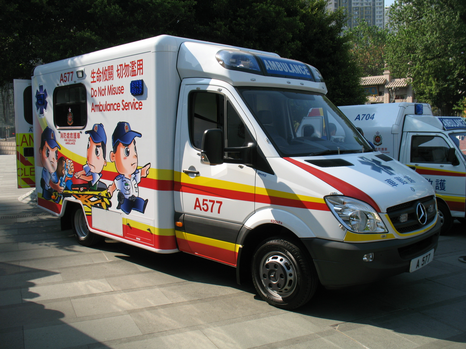 中文（香港）: 香港消防處從2009年起，引入了全新世代型號的救護車，名為平治Sprinter518/519CDI救護車，全車配備來自波蘭製造的BAUS救護車車身，及全面採用左趟門式設計和左邊伸縮腳踏板裝置，此車外型有別於昔日英國製造的UVG救護車車身。 此外，為配合當局宣傳及推廣“慎用緊急救護服務運動”，處方特別為旗下上述新型號救護車均髹上卡通救護員圖案及左右邊寫上口號，分別是「分秒必爭請讓路」和「生命悠關，切勿濫用」，向普羅大眾發出一個訊息，教育市民慎用緊急救護服務等不當行為。